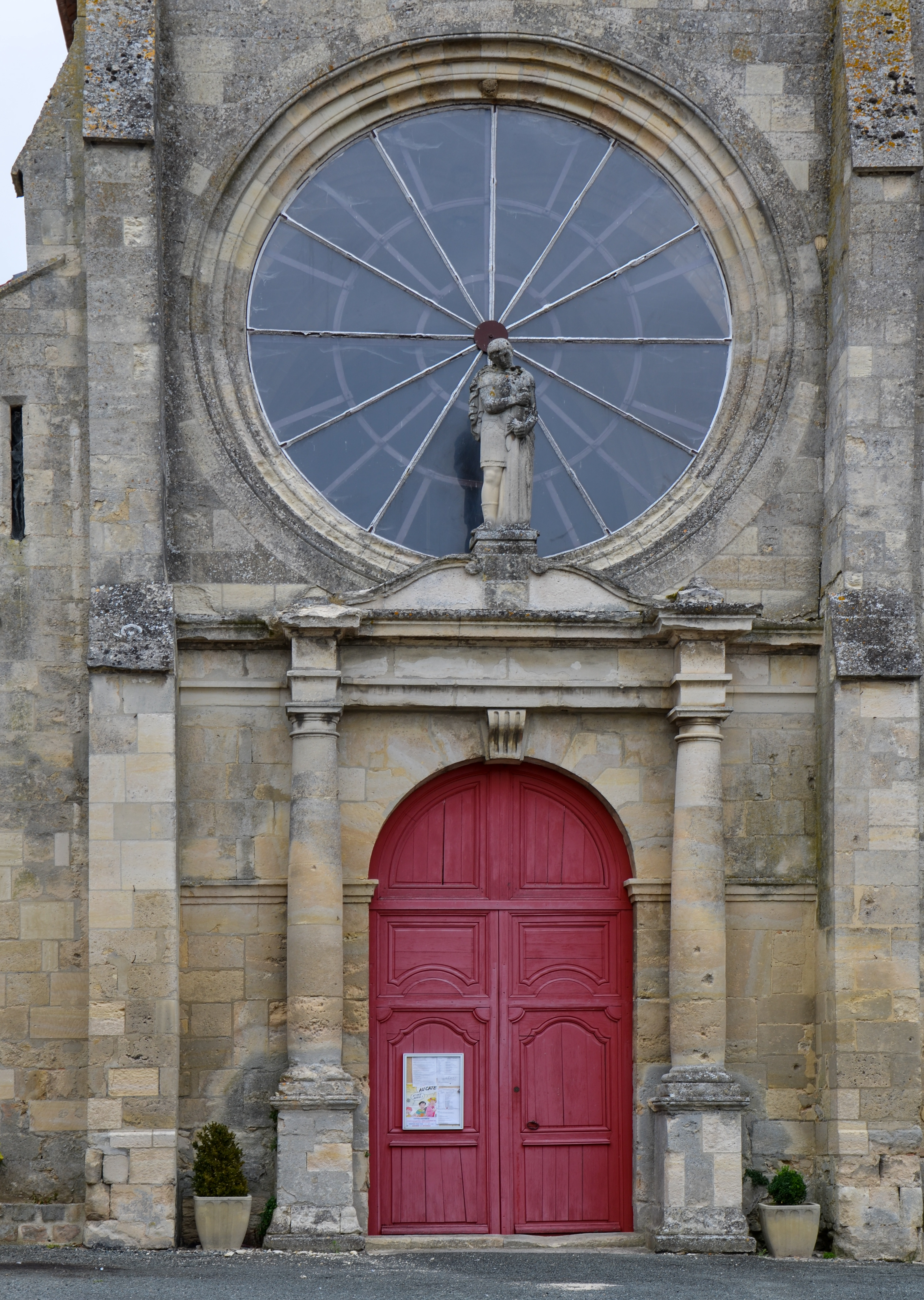 Église St Martin de Mareuil-sur-Ourcq, Oise, Picardie, France